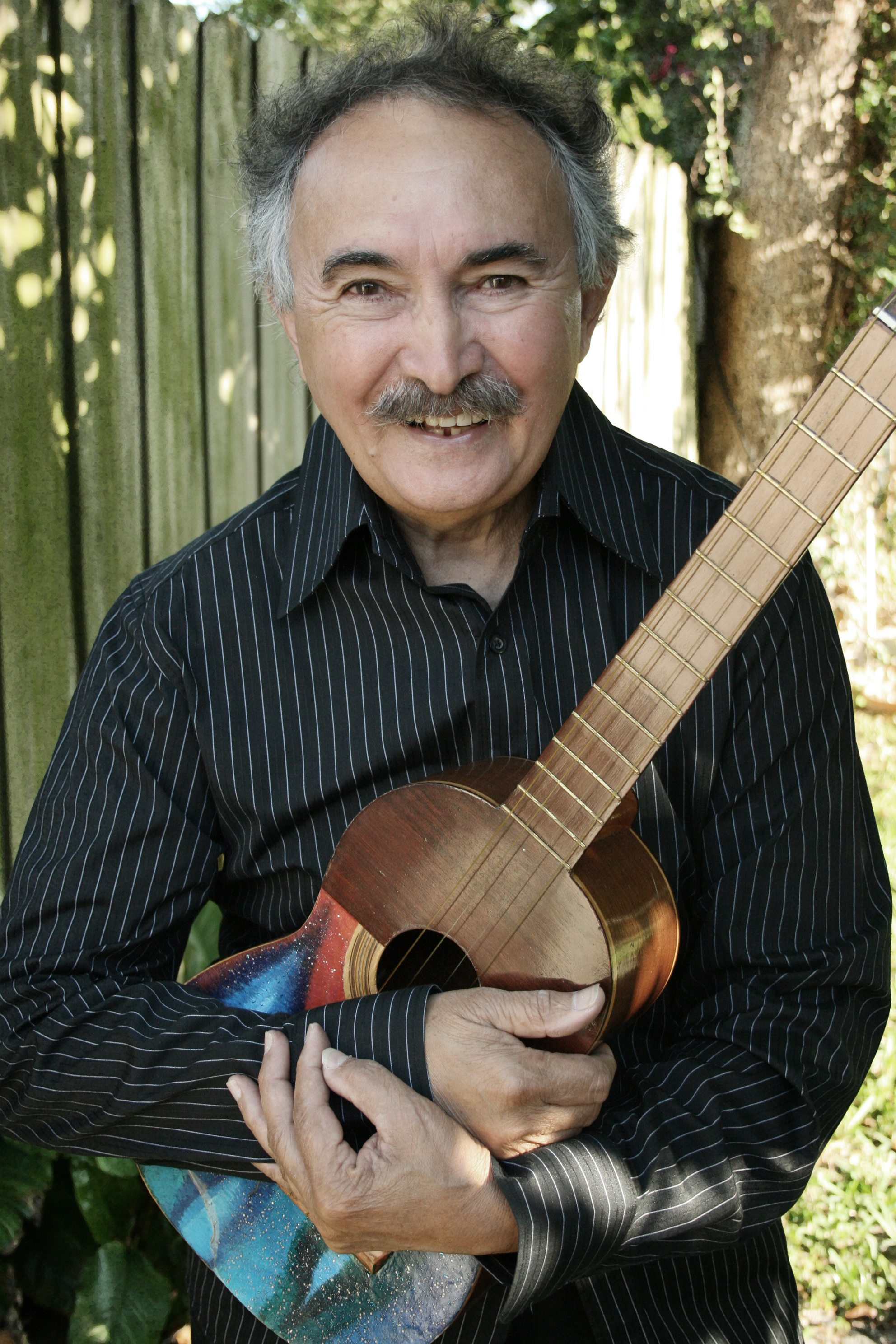 Enrique Hidalgo. Poetay compositor venezolano